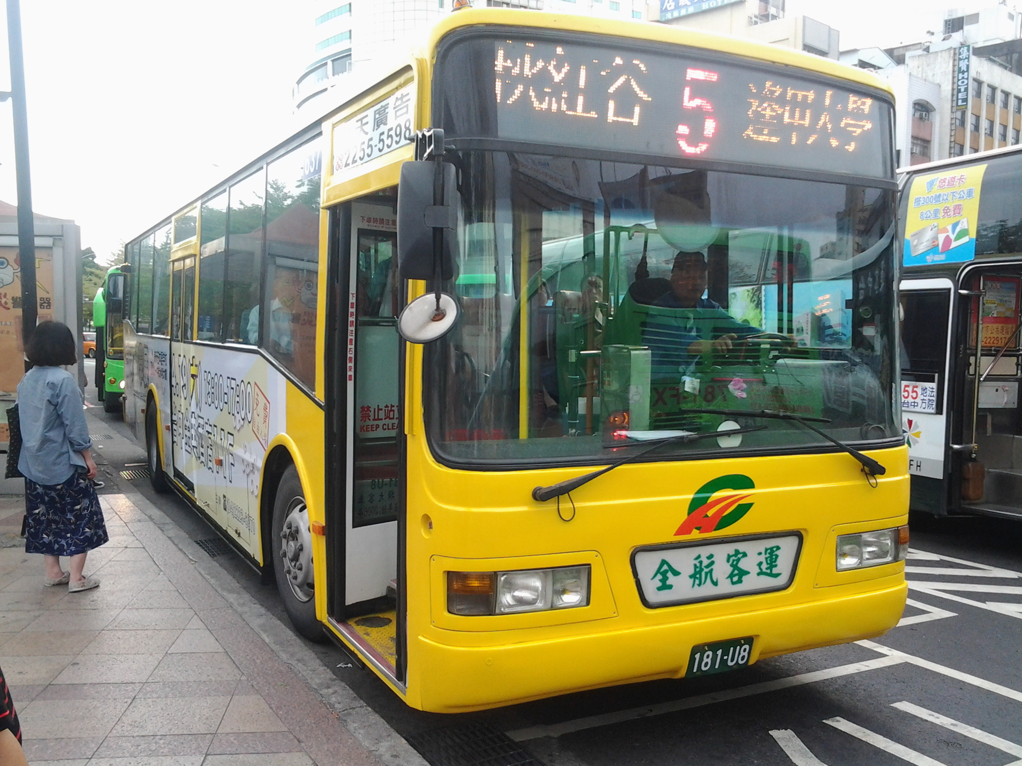 2006(2014) HINO ERK2JRL